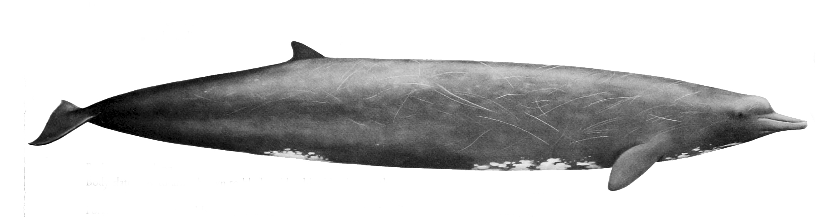 Berardius bairdii